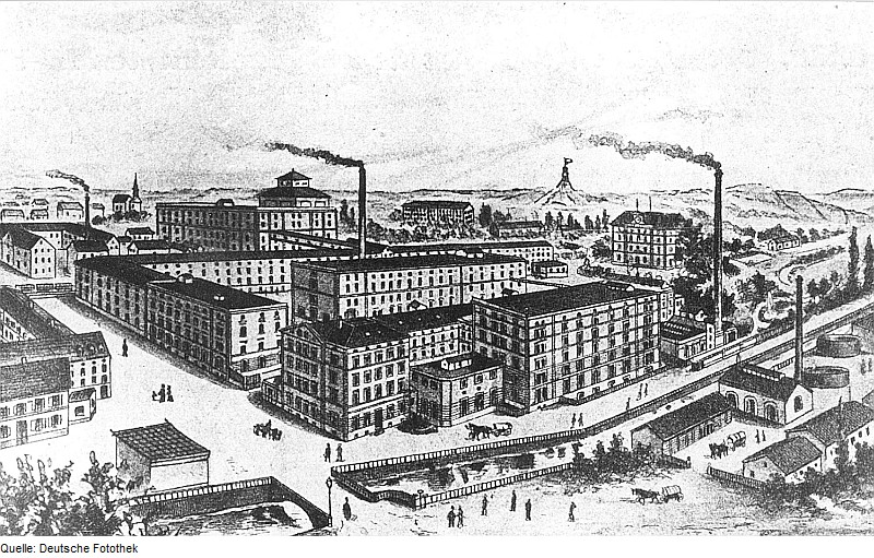 Original image description from the Deutsche Fotothek Dresden-Plauen. Bienertmühle (frühere Hofmühle), aus: Die Mühle vom 3.5.1907